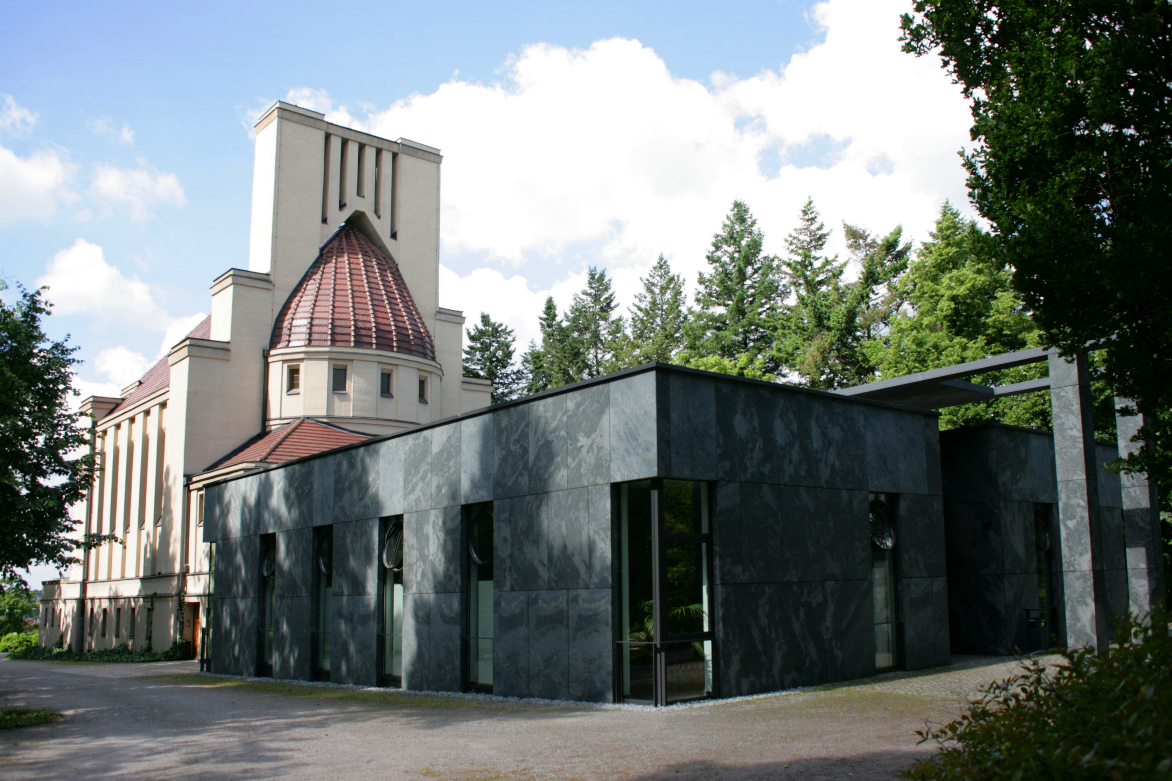 Krematorium am Luthersteig in Görlitz